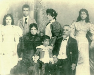 El general Eloy Alfaro Delgado (presidente de Ecuador) y su familia. Atrás (izquierda a derecha): Esmeralda, Olmedo, Colombia y América. Delante (izquierda a derecha): Ana Paredes de Alfaro, Colón y Eloy Alfaro Delgado.